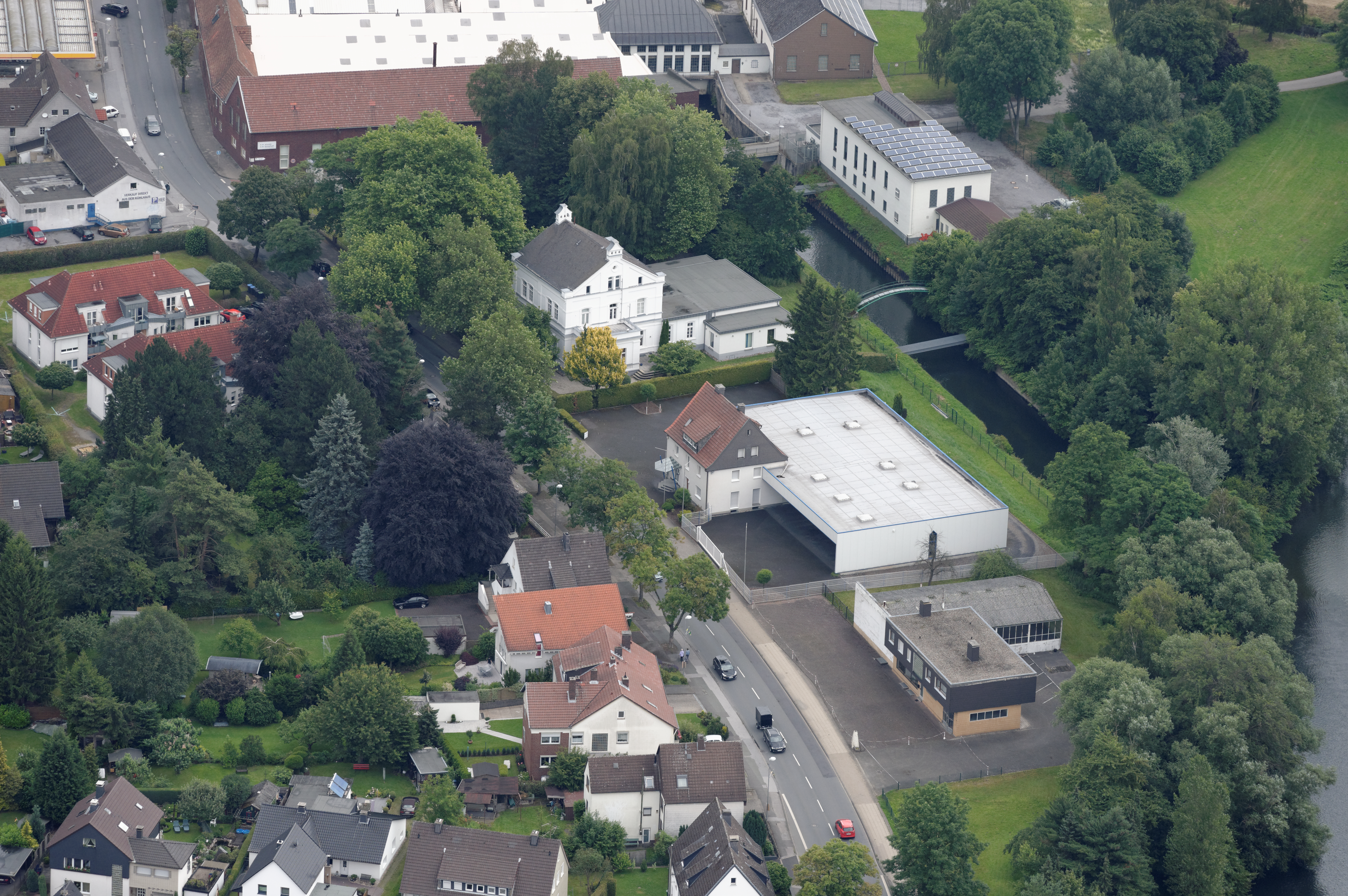 Fotoflug Sauerland Nord. Wickede (Ruhr), Hauptstraße, Weiße Villa, Ruhr mit Untergraben und Wasserkraftwerk, angeschnitten Werksanlagen von Wickeder Westfalenstahl, Blickrichtung Ost The making of this document was supported by the Community-Budget of Wikimedia Germany.